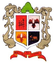 Escudo de Armas de Nahuatzen